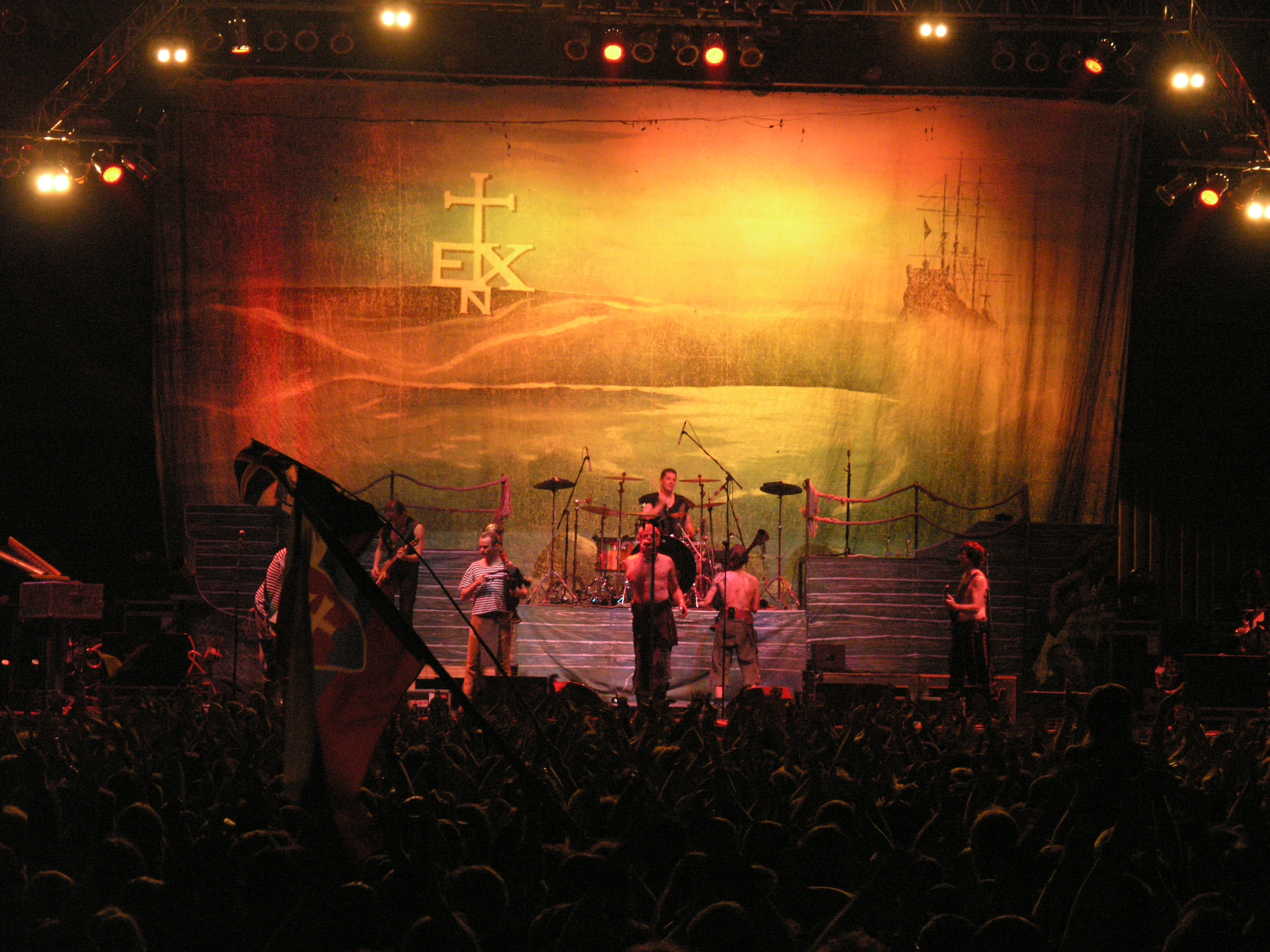 Zespół In Extremo w czasie festiwalu Masters of Rock 2007